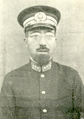 Bân-lâm-gú: 三輪幸助 Miwa Kōsuke